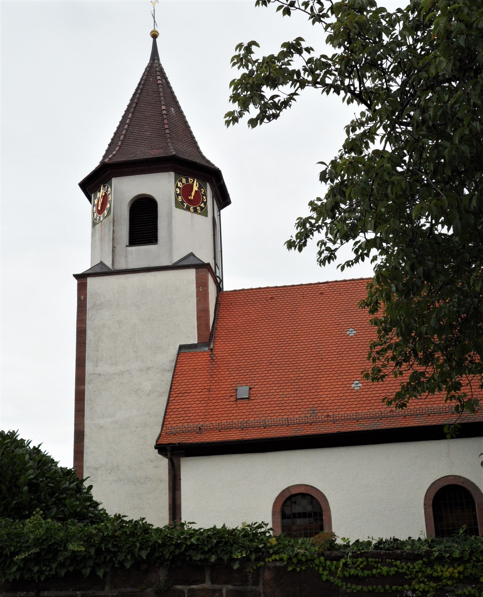 Evang. Nikolauskirche Ottenhausen, Gemeinde Straubenhardt im Enzkreis, Baden-Württemberg. Als Predigtsaalkirche 1791 erbaut von Johann Adam Groß d.J.